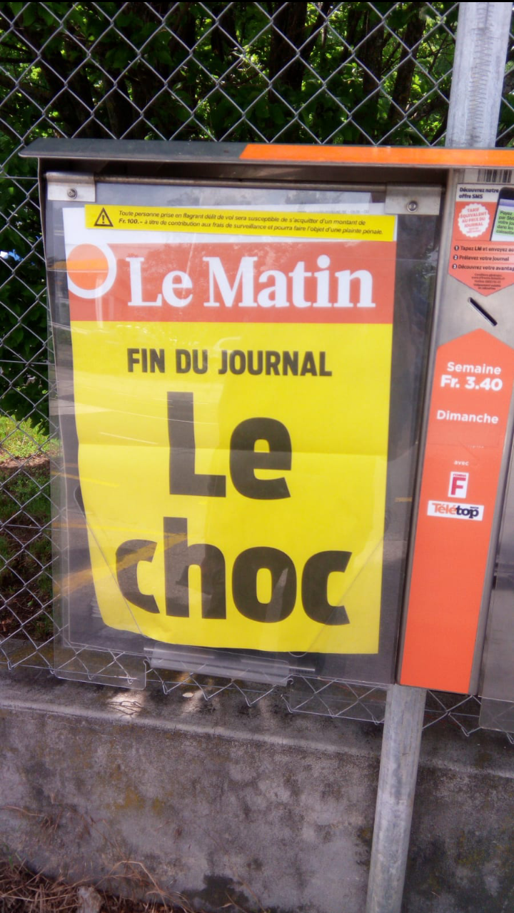 La caissette du journal le matin le 08 Juin 2018 à Orbe. Une des dernières manchette du journal.